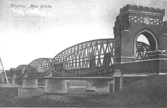 Most kolejowa w Tczewie ok. 1900. Bruecke von Dirschau about 1900